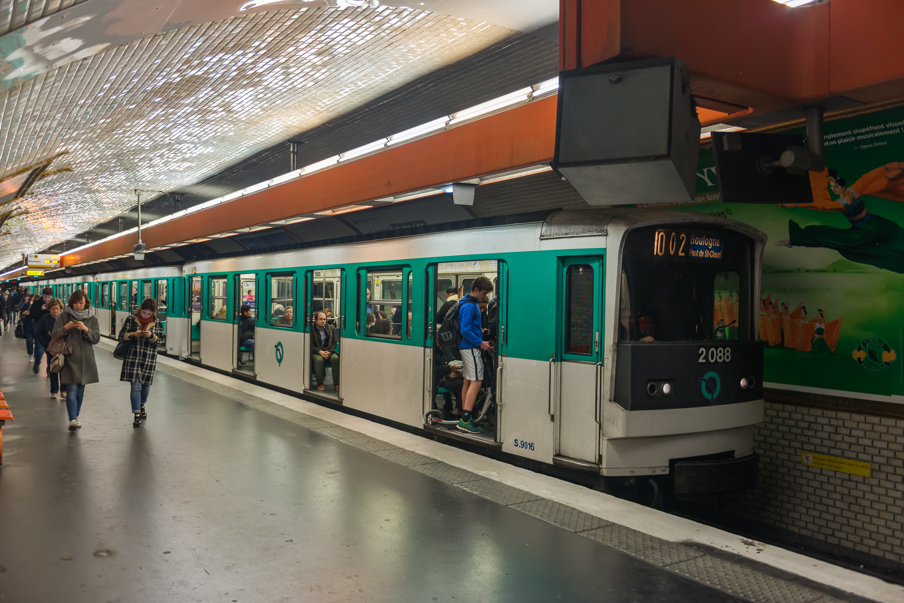 Paris Métro- MF67- Ligne 10- La Motte Picquet-Grenelle